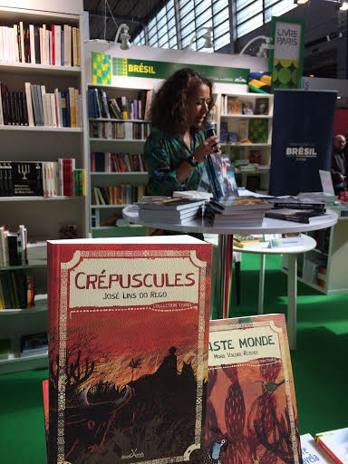 Paula Anacaona, la fondatrice des Editions Anacaona, lors d'une conférence donnée au stand de l'ambassade du Brésil à l'occasion du Salon du livre de Paris, en 2015.